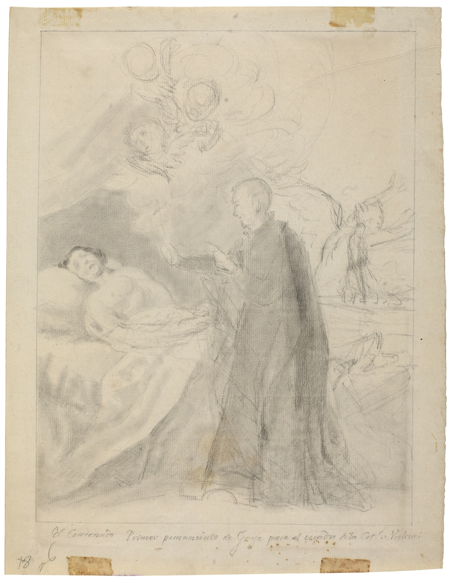 San Francisco de Borja y el moribundo impenitente. Dibujo preparatorio, lápiz negro sobre papel verjurado, 352 x 273 mm.